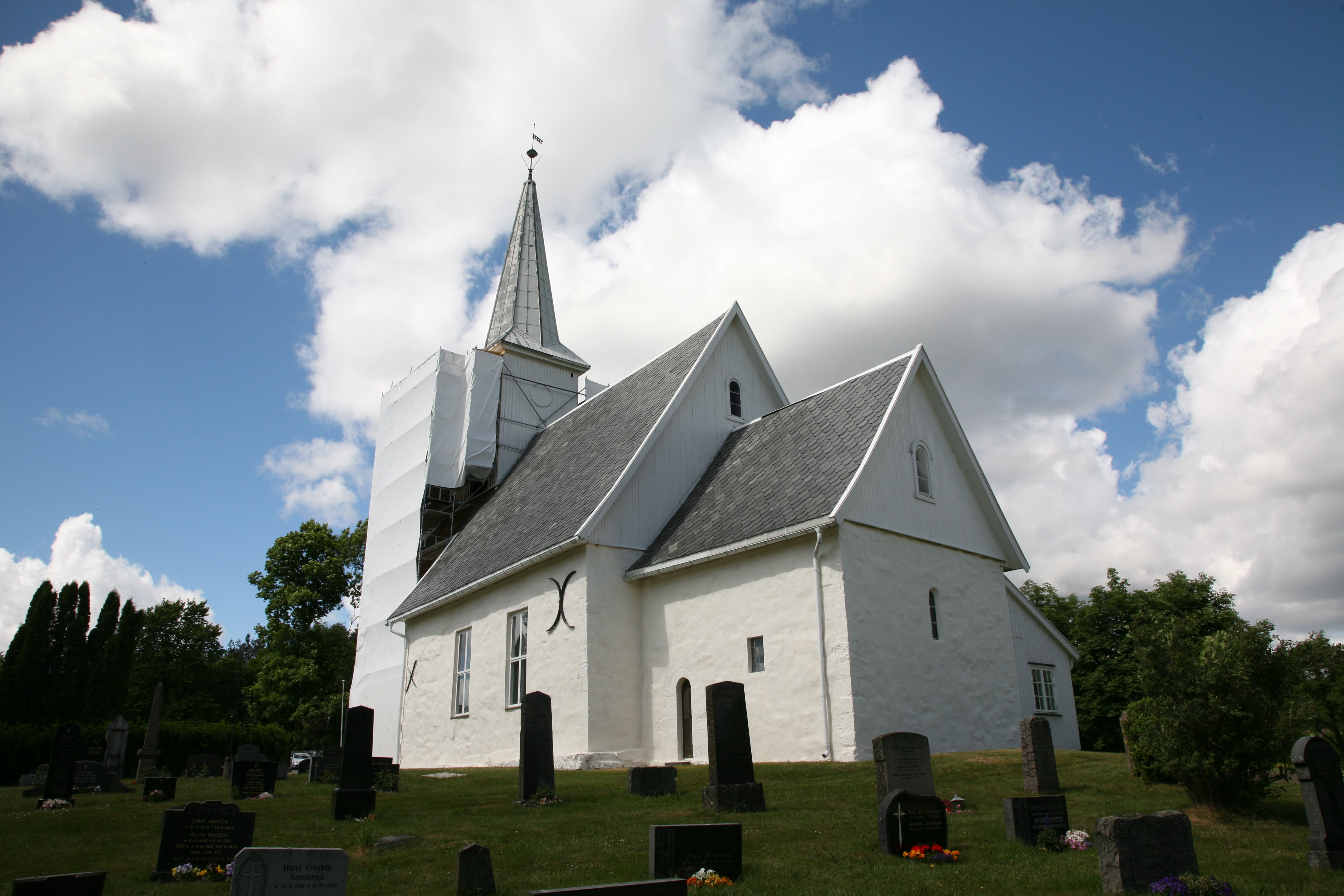 Lørenskog church from 1150-1250 in Lørenskog, Akershus, Norway